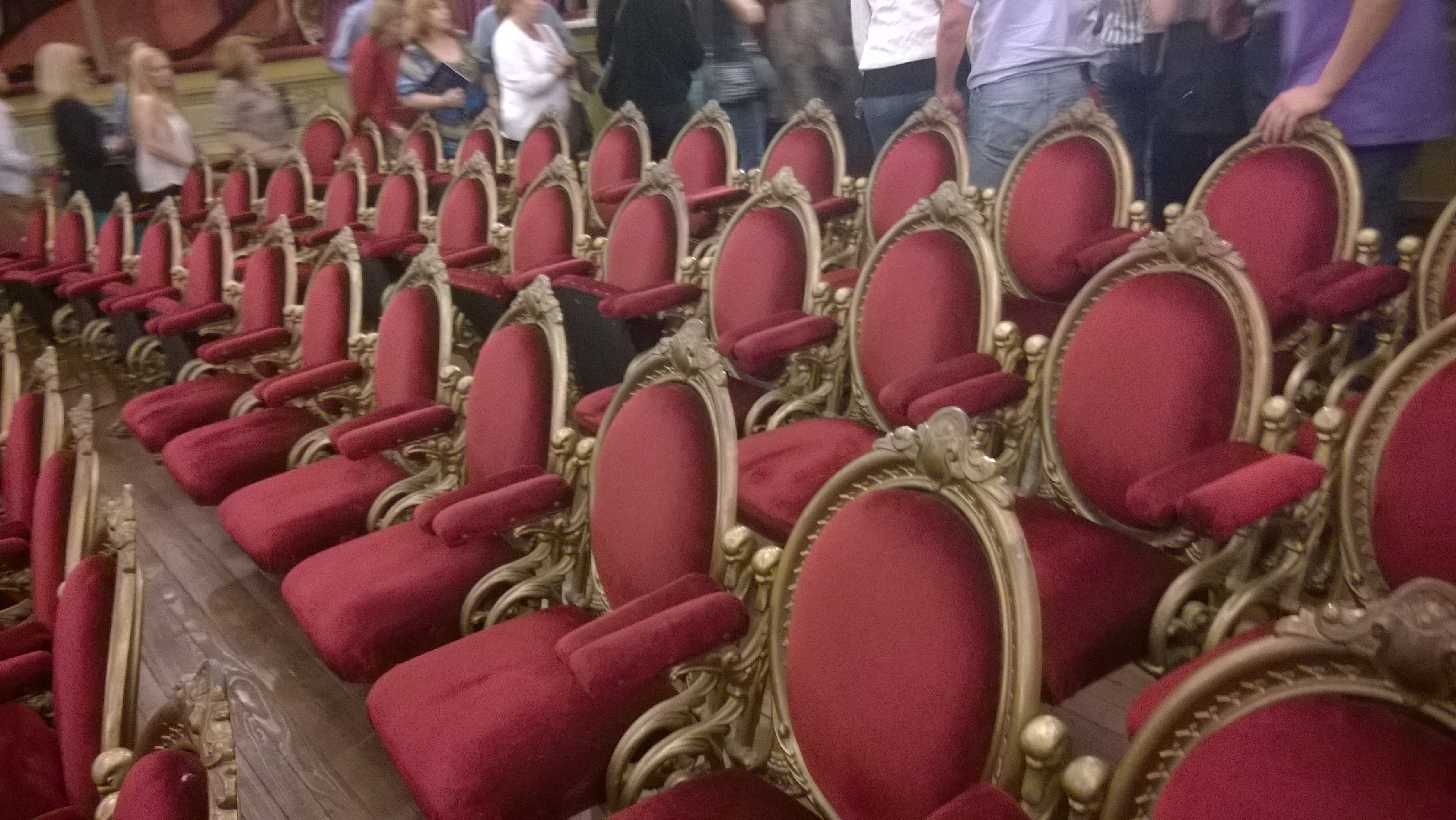 Detalle de la sala del Teatro del Libertador General San Martín de Córdoba Argentina.